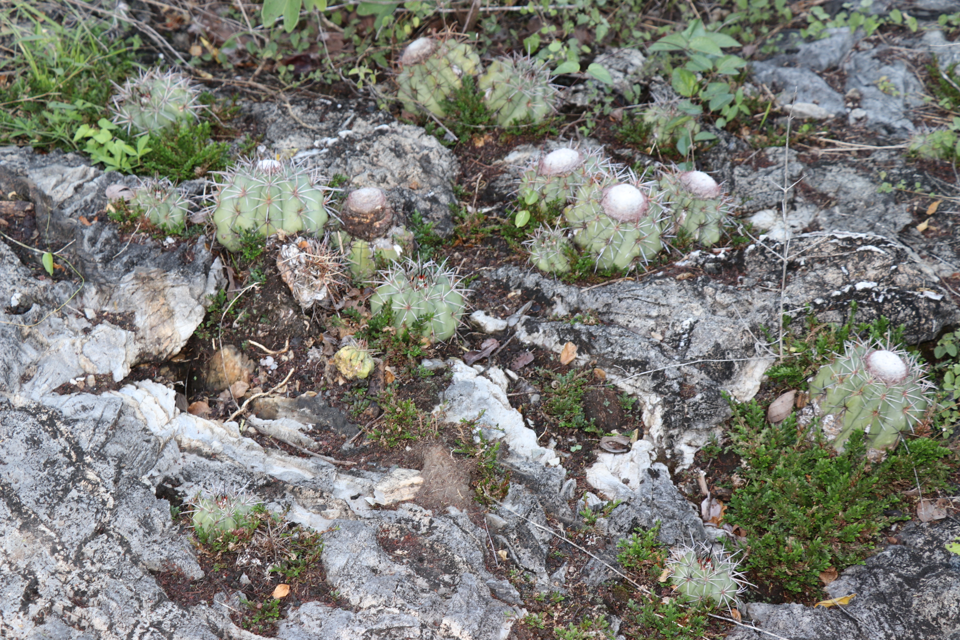 Melocactus sergipensis am Typstandort , Sergipe / Brasil